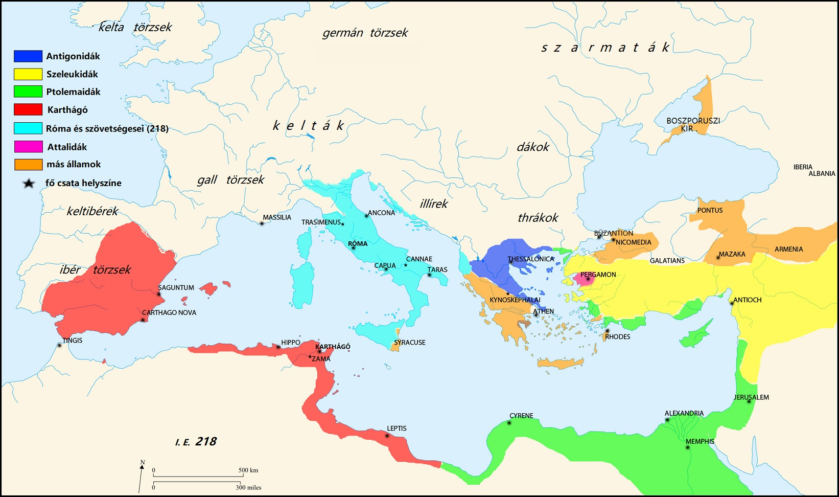 A Mediterráneum Kr. e. 218-ban